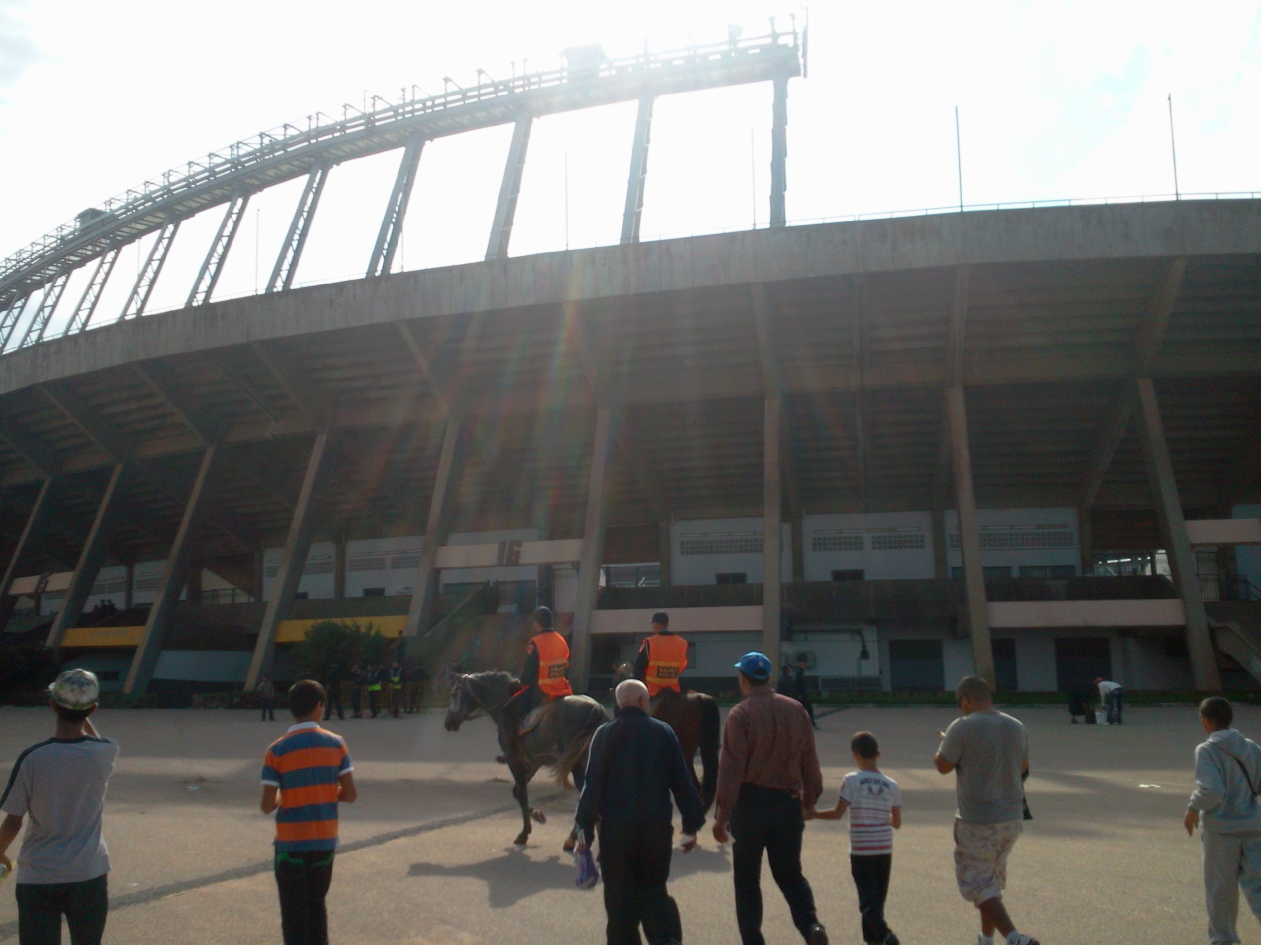 Entrée du Complexe Moulay Abdellah.